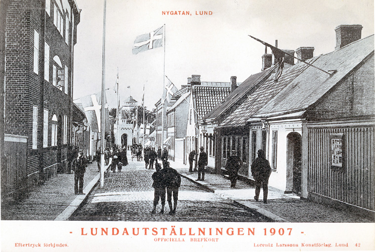 Nygatan i Lund vid invigningsdagen av Lundautställningen